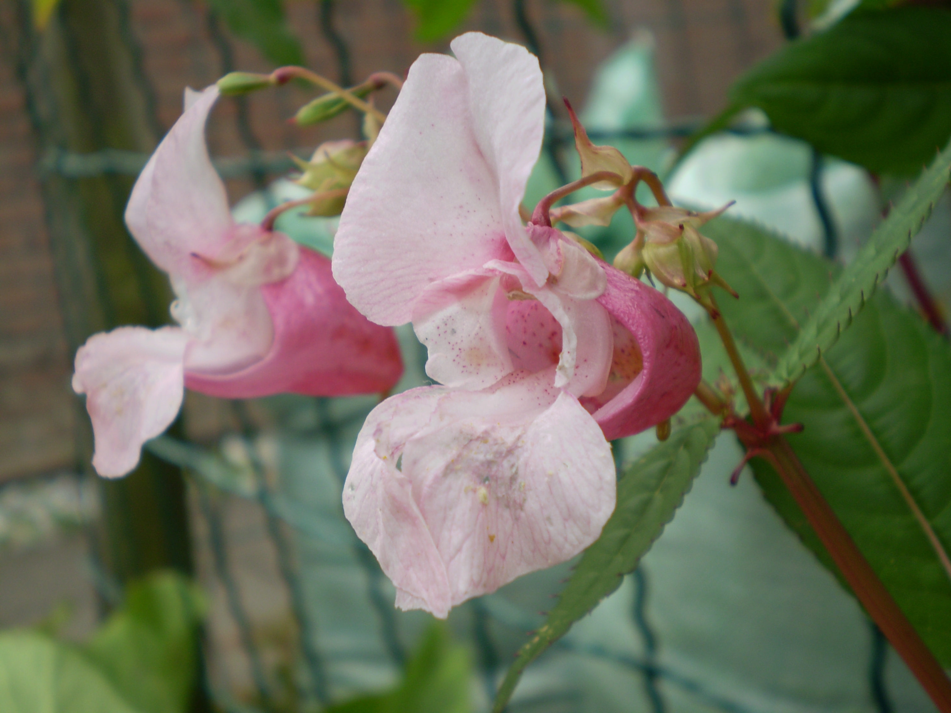 Impatiens glandulifera reuzenbalsemien